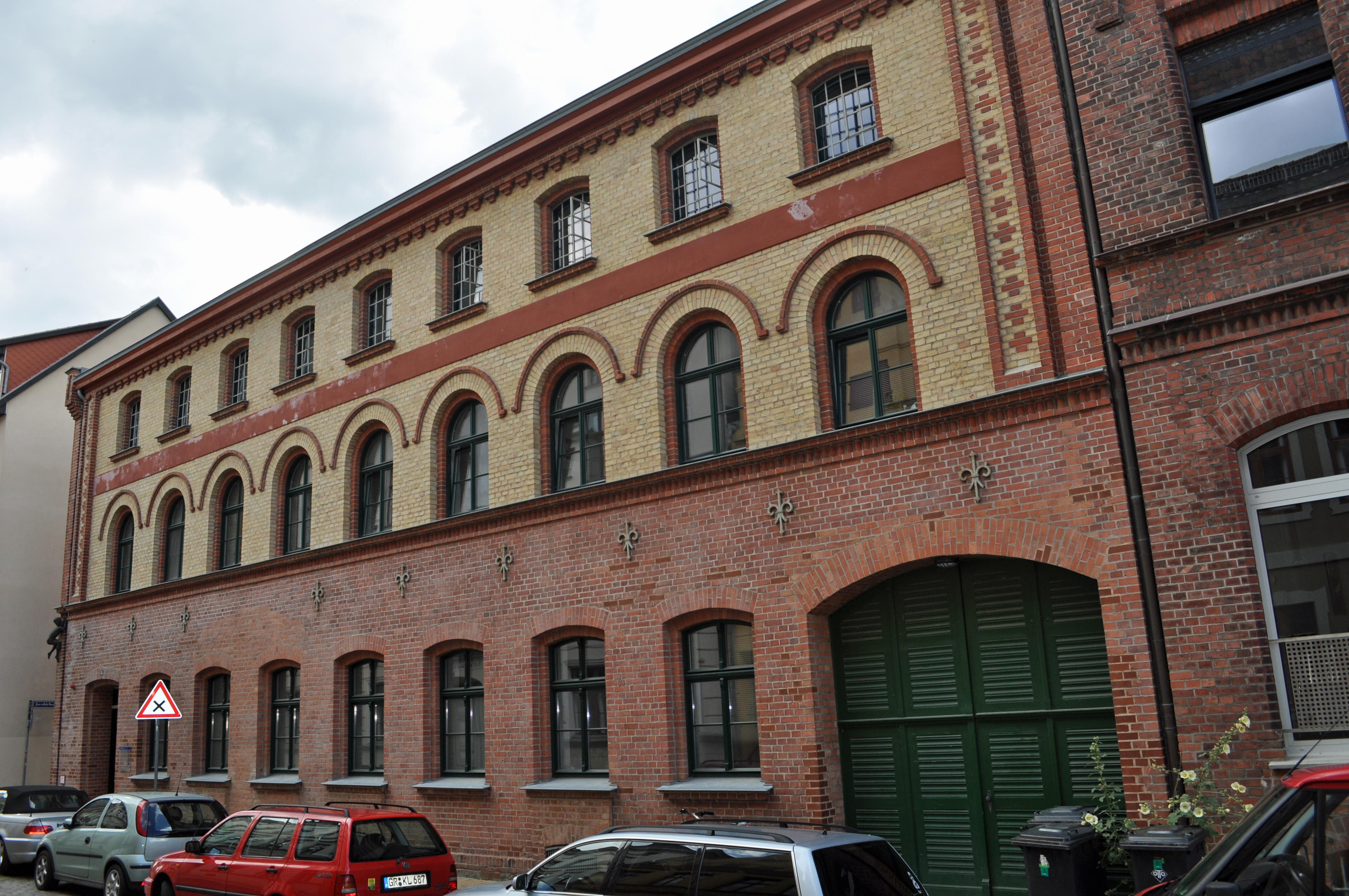 Das Foto zeigt ein Haus (bzw. Details des Hauses) in der Frankenstraße in Stralsund, Deutschland. Die Hausnummer steht im Dateinamen. Aufgenommen am 19. Juli 2011 vom Benutzer:Klugschnacker.